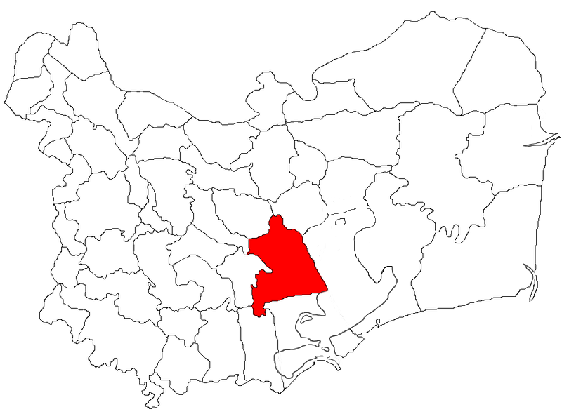 Categorie:Hărţi ale judeţului Tulcea